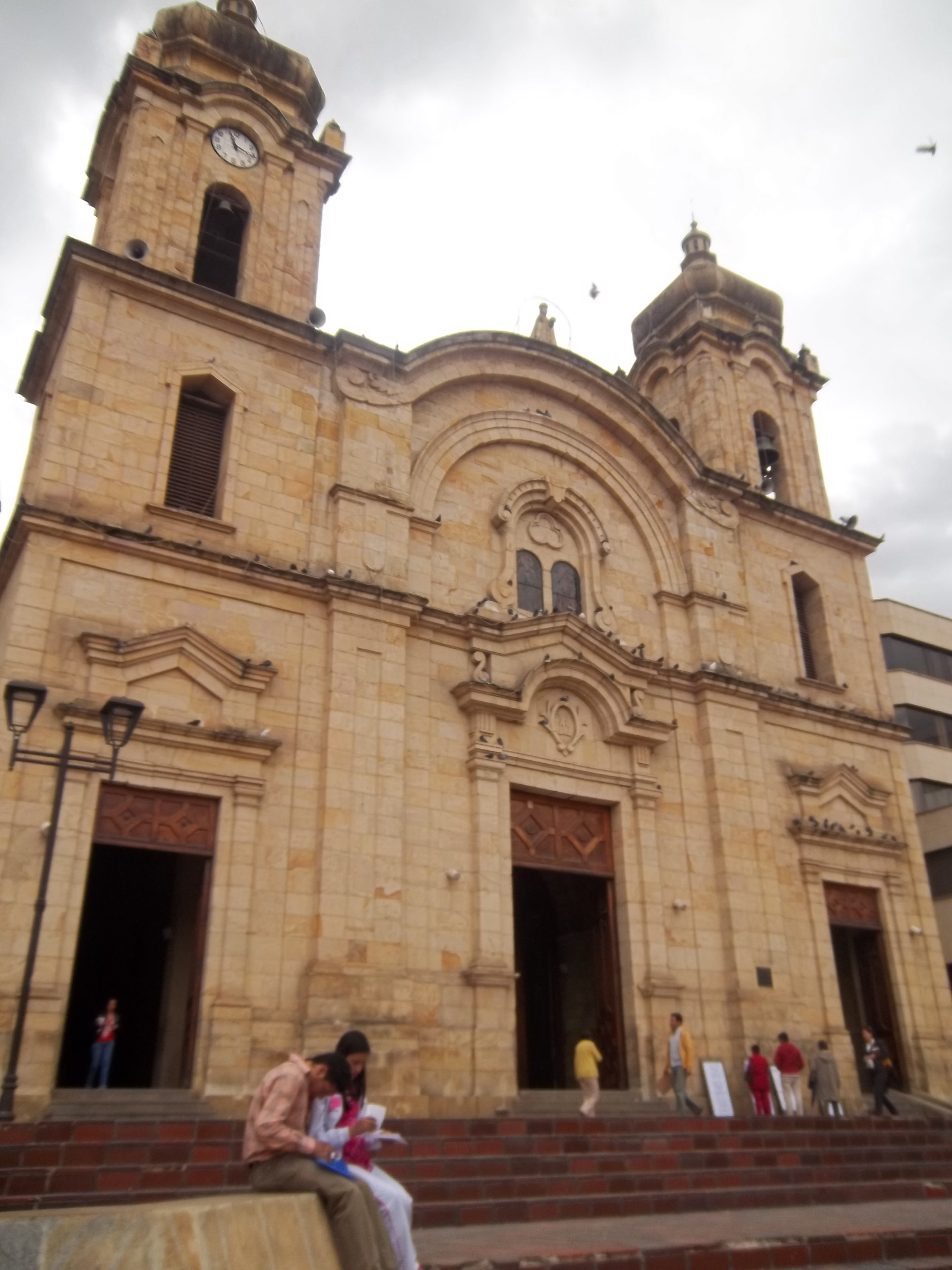 Catedral Principal De Duitama-Boyaca